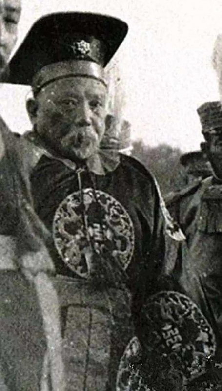 袁世凱祭天